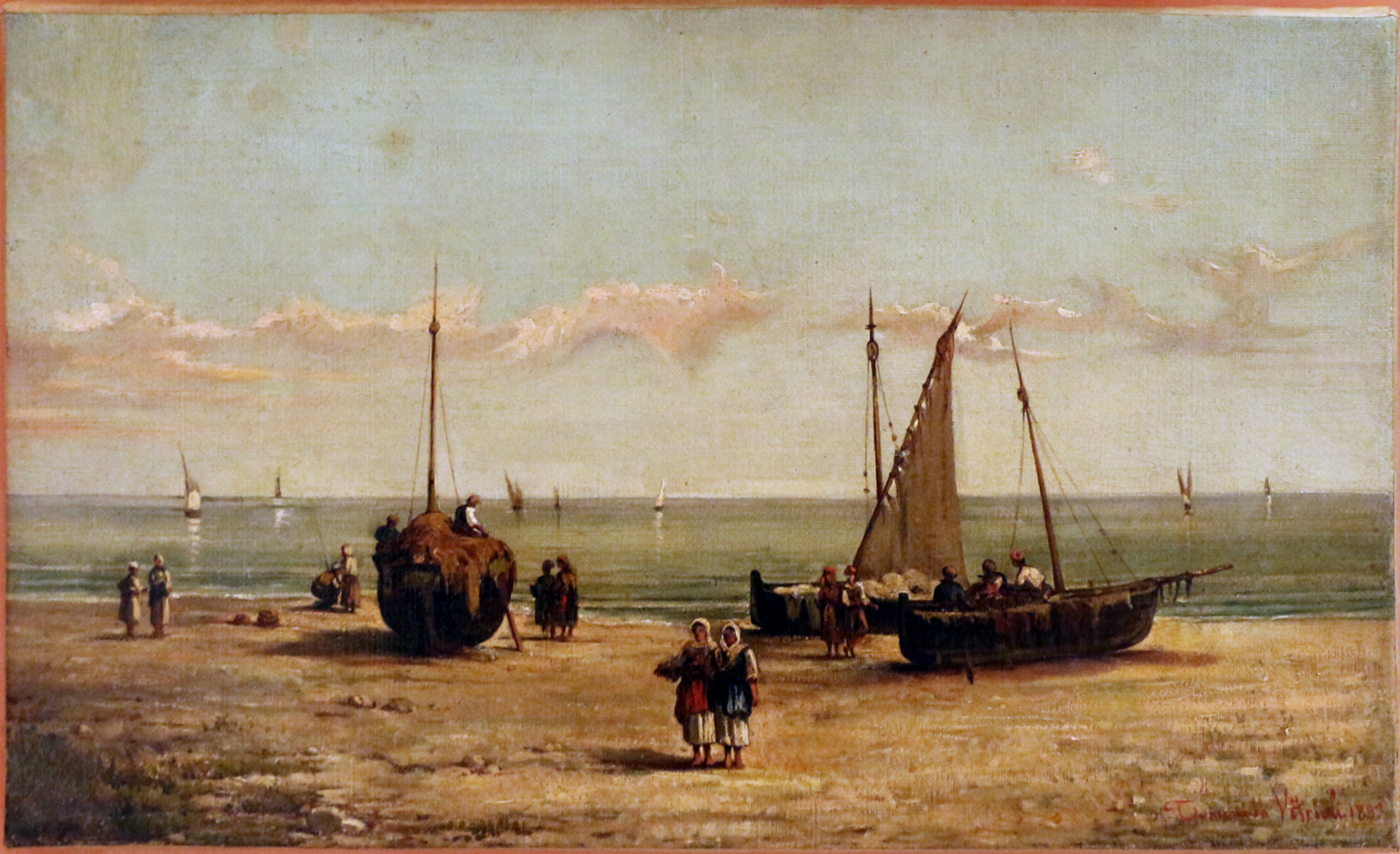 Pinacoteca civica di Reggio Calabria - paintings This is a photo of a monument which is part of cultural heritage of Italy.